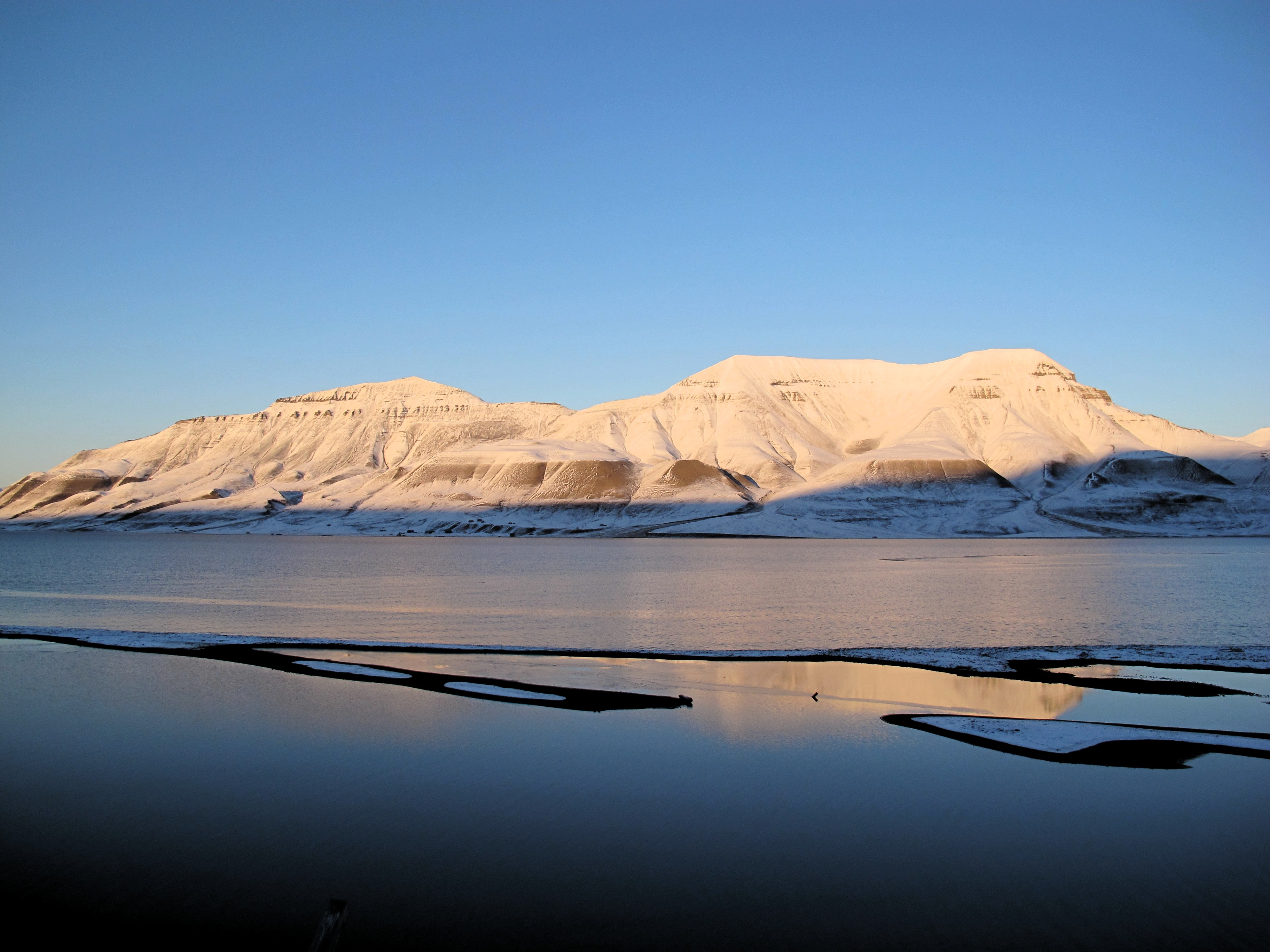 autore: Chiappini Mirko. descrizione: Nella parte sinistra Adventtoppen e nella parte destra Hiortfjellet visti da Longyearbyen.